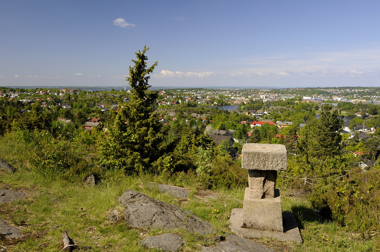 Siktebord ved ved Bjørnåsen batteri